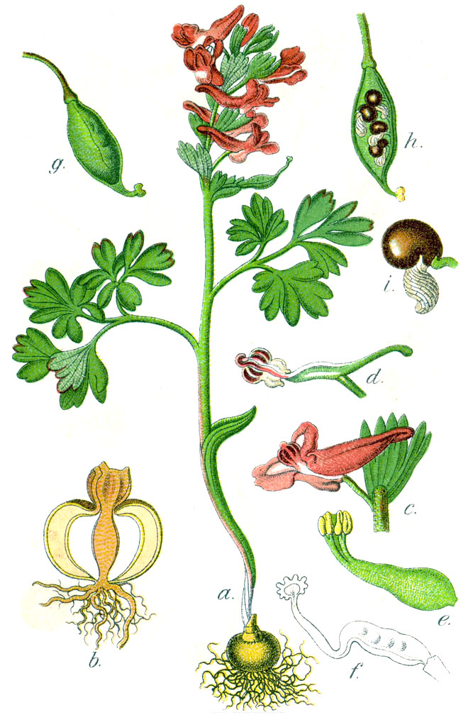 Corydalis solida (L.) Clairv., syn. Fumaria solida (L.) Mill. Original Caption Grosser Lerchensporn, Fumaria solida